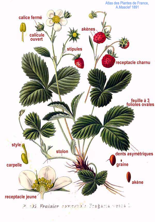 Fragaria vesca L.